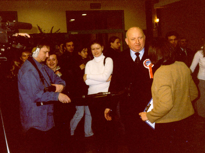 PL, Warsaw, Hotel Gromada, SLD - spotkanie prounijne